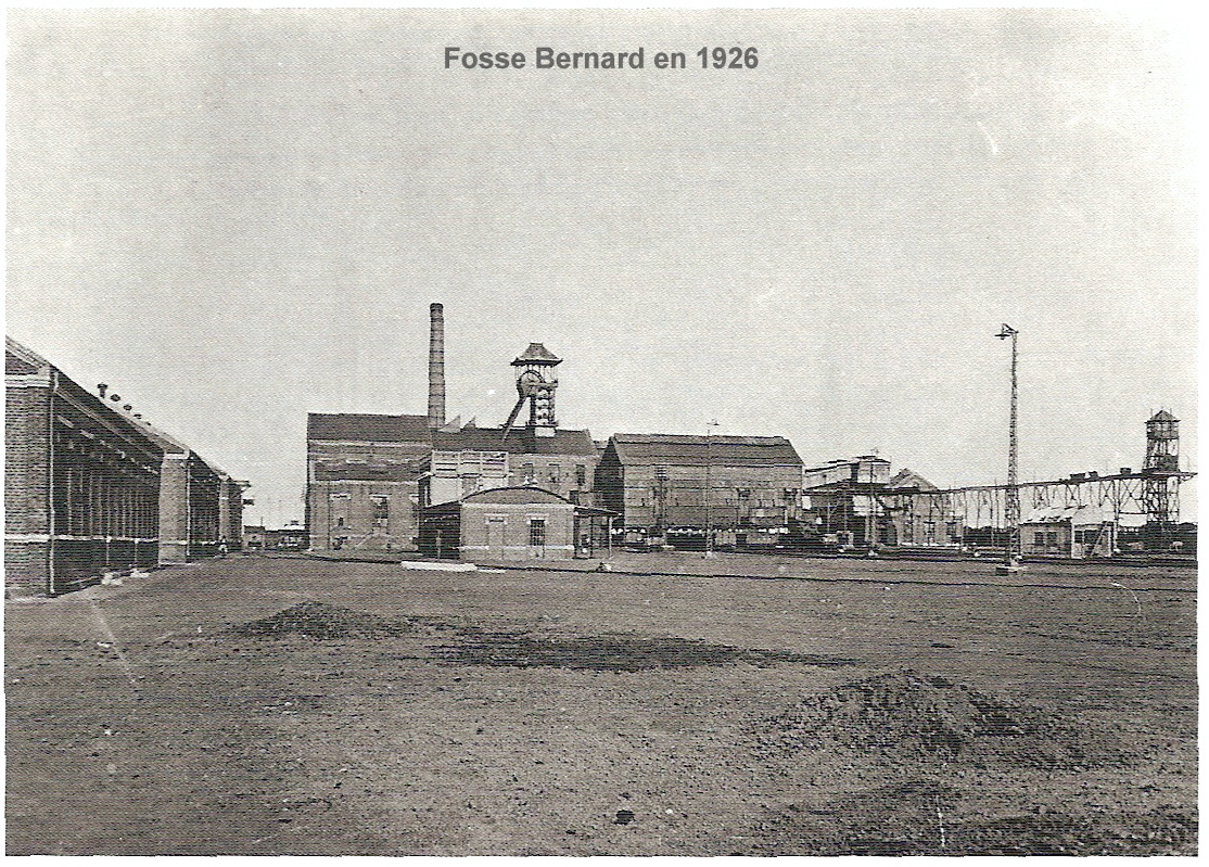 Fosse Bernard de Frais-Marais Douai en 1926